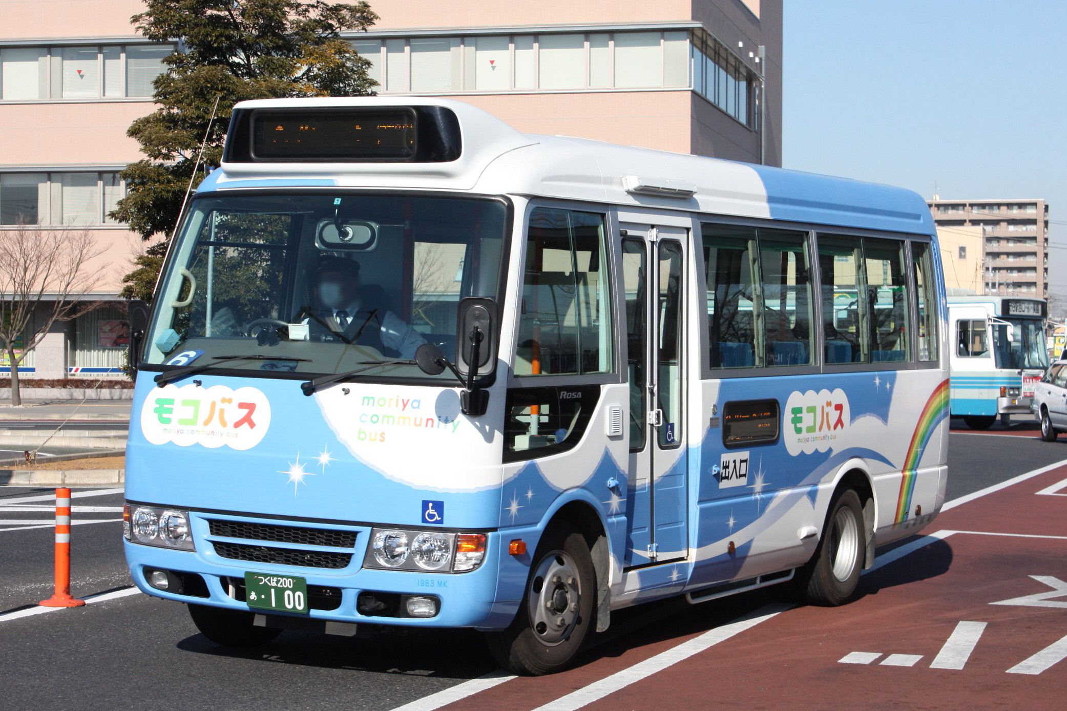 守谷市コミュニティバス（モコバス） 車番:1983MK PDG-BE64DE 守谷駅にて